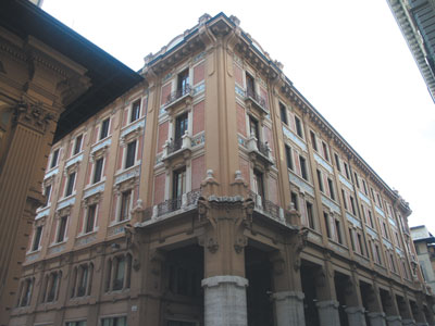 Palazzo del Paciarelli, piazza della Repubblica, Firenze.